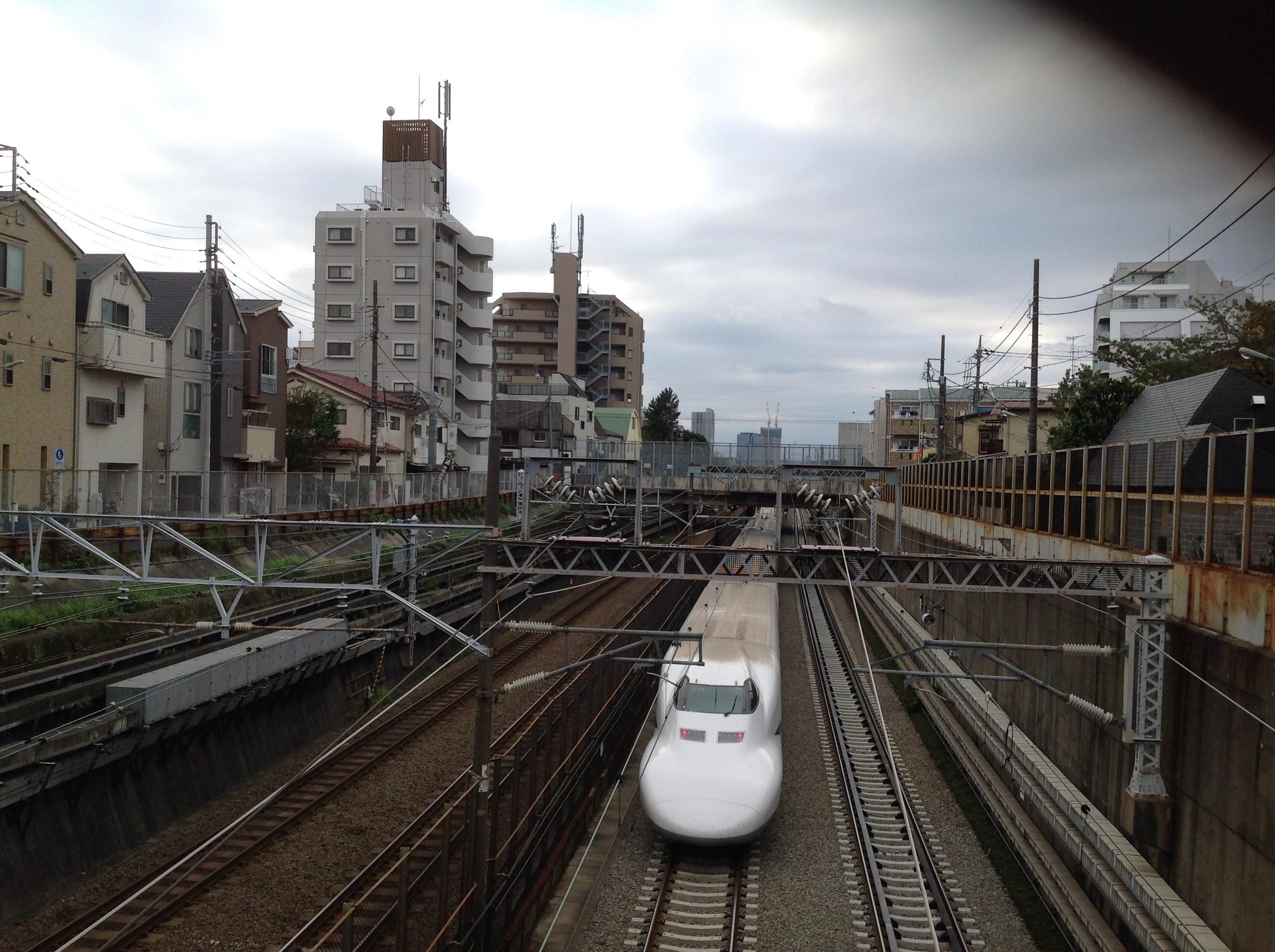 御嶽山駅から撮影した下を通過する新幹線700系。